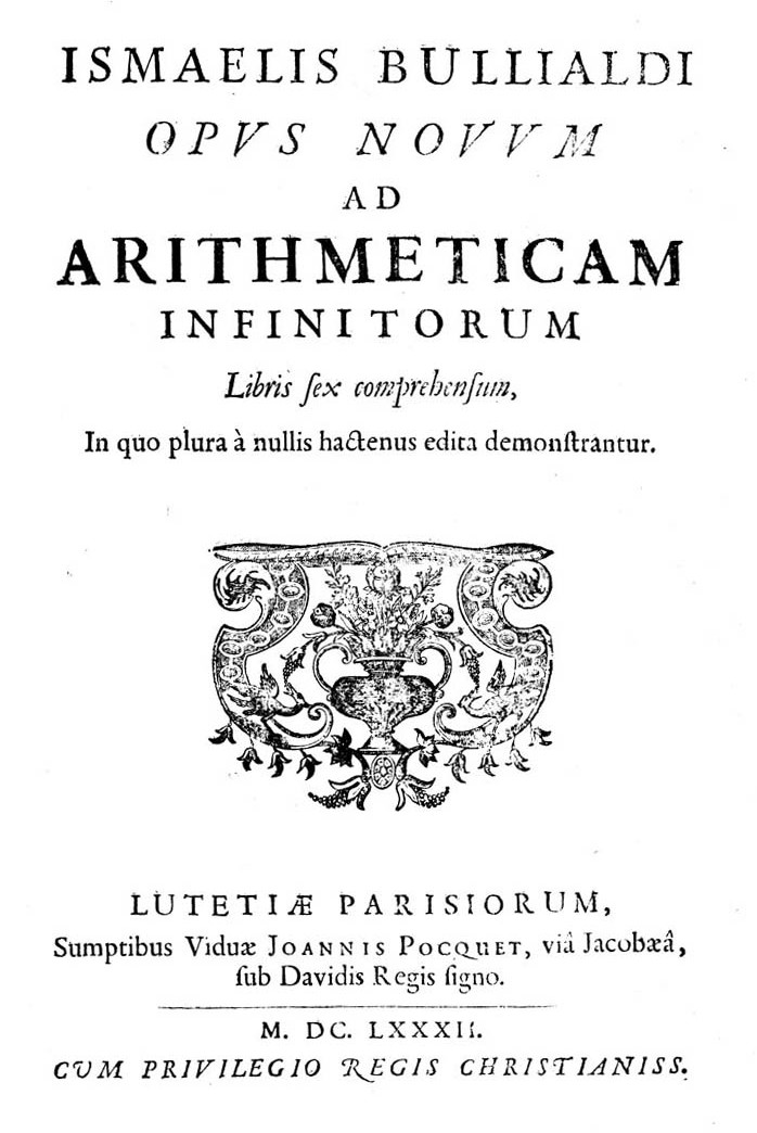 Ismaelis Bullialdi Opus nouum ad arithmeticam infinitorum libris sex comprehensum, in quo plura a nullis hactenus edita demonstrantur. - Lutetiae Parisiorum : sumptibus viduae Joannis Pocquet, via Jacobaea, sub Davidis Regis signo, 1682. - [4], 425 [ma 427], [1] p., 8 c. di tav. ripiegate : ill. ; 2° .